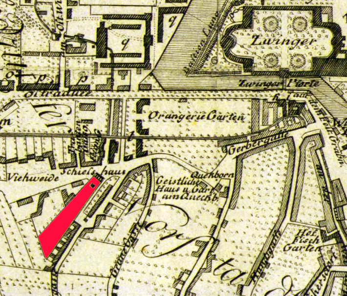 Auszug aus: Grundriss von der Churfürstl. Sächsis. Residentzstadt Dresden mit der Darstellung der Ratsschießanlage (rot), aus: Dresden und die umliegende Gegend bis Elsterwerda, Bauzen, Tetschen, Hubertsburg, Freyberg, Töplitz und Rumburg eine skizzirte Darstellung für Natur- und Kunstfreunde; nebst einem Grundrisse von der Stadt und einer Reisekarte durch die Gegend derselben, 1801.